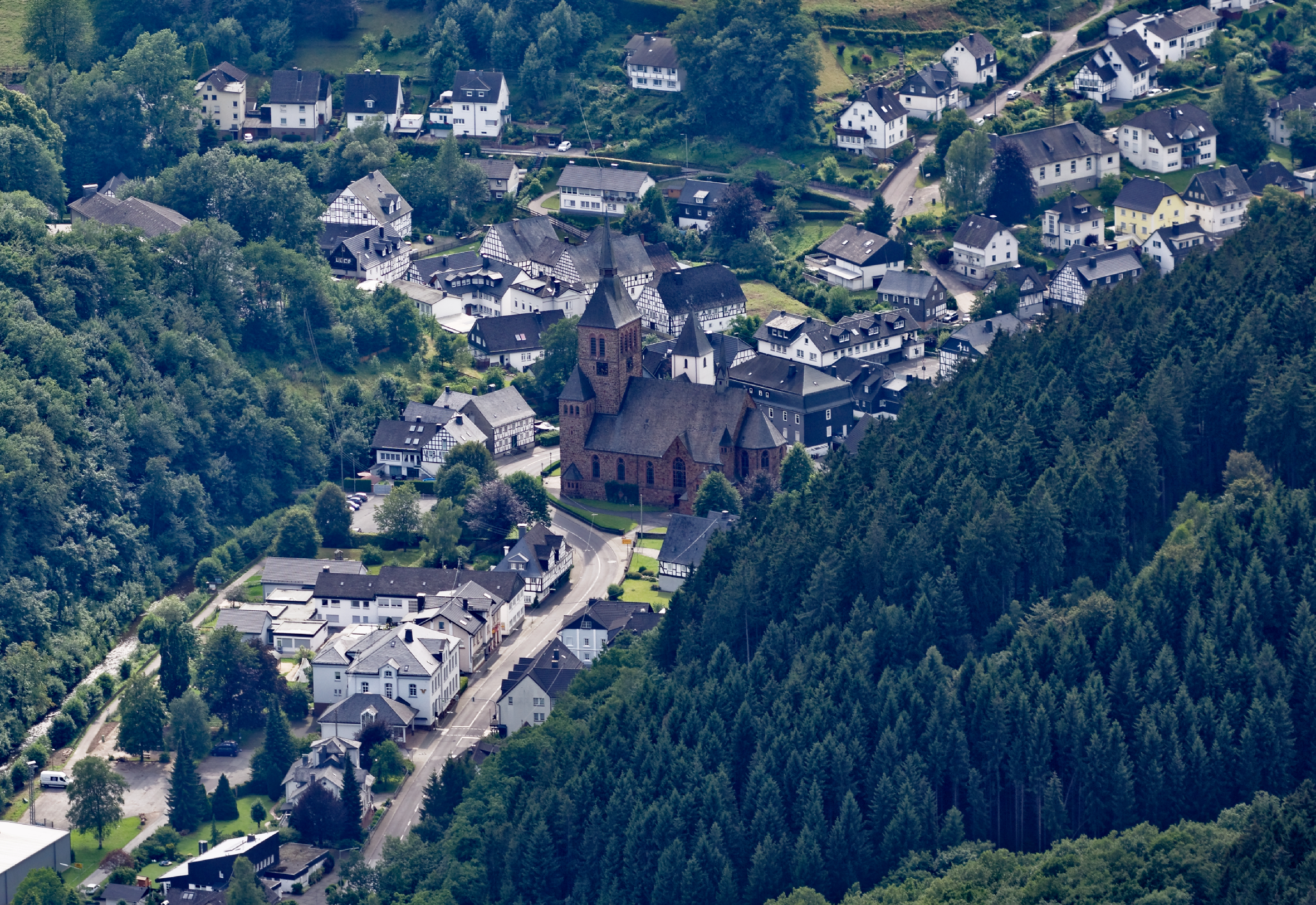 Fotoflug Sauerland West. Luftaufnahme: Kirchhundem mit der katholischen Pfarrkirche St. Peter und Paul an der Hundemstraße.